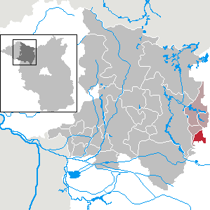 Rüthnick in Brandenburg (Country) - District Ostprignitz-Ruppin